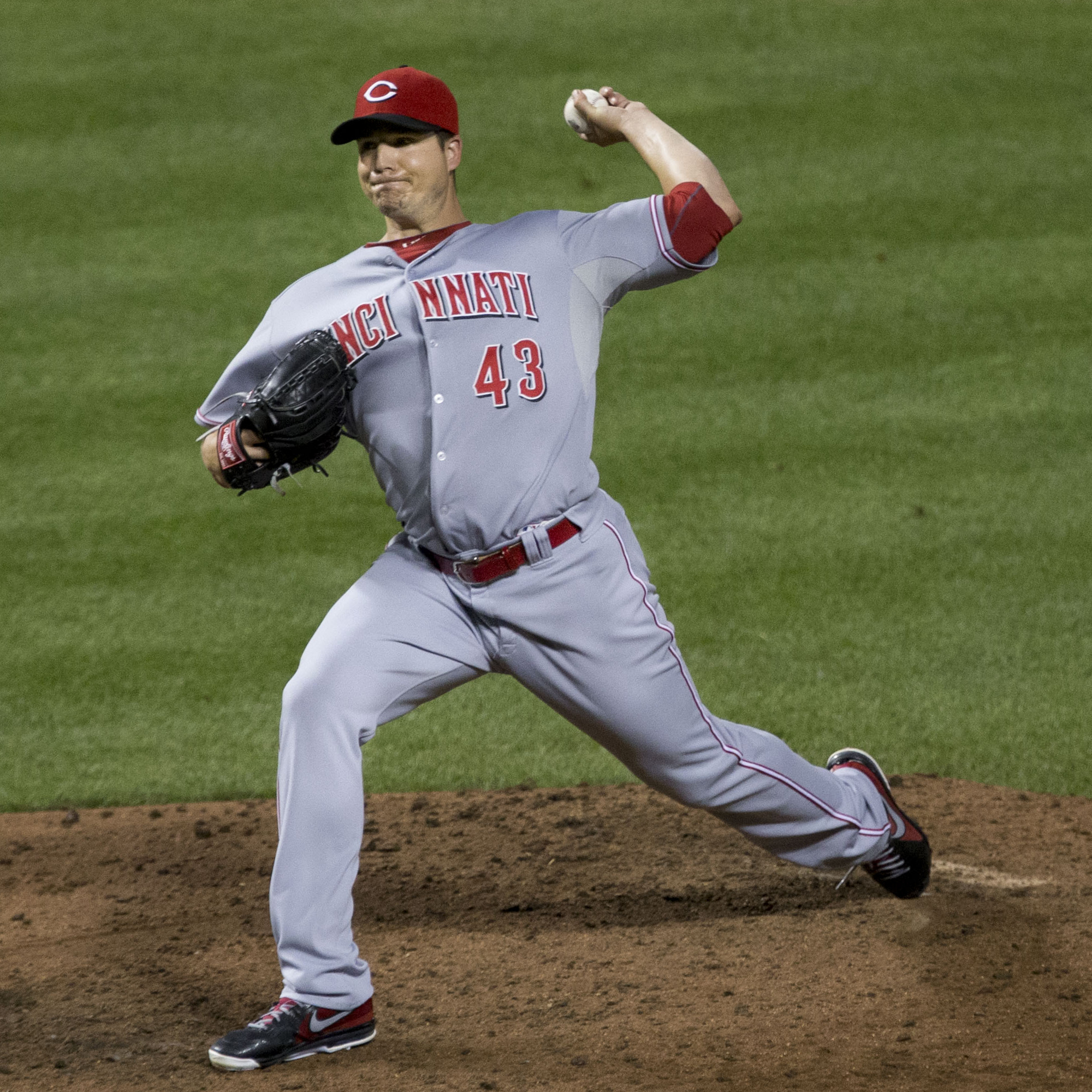 Manny Parra